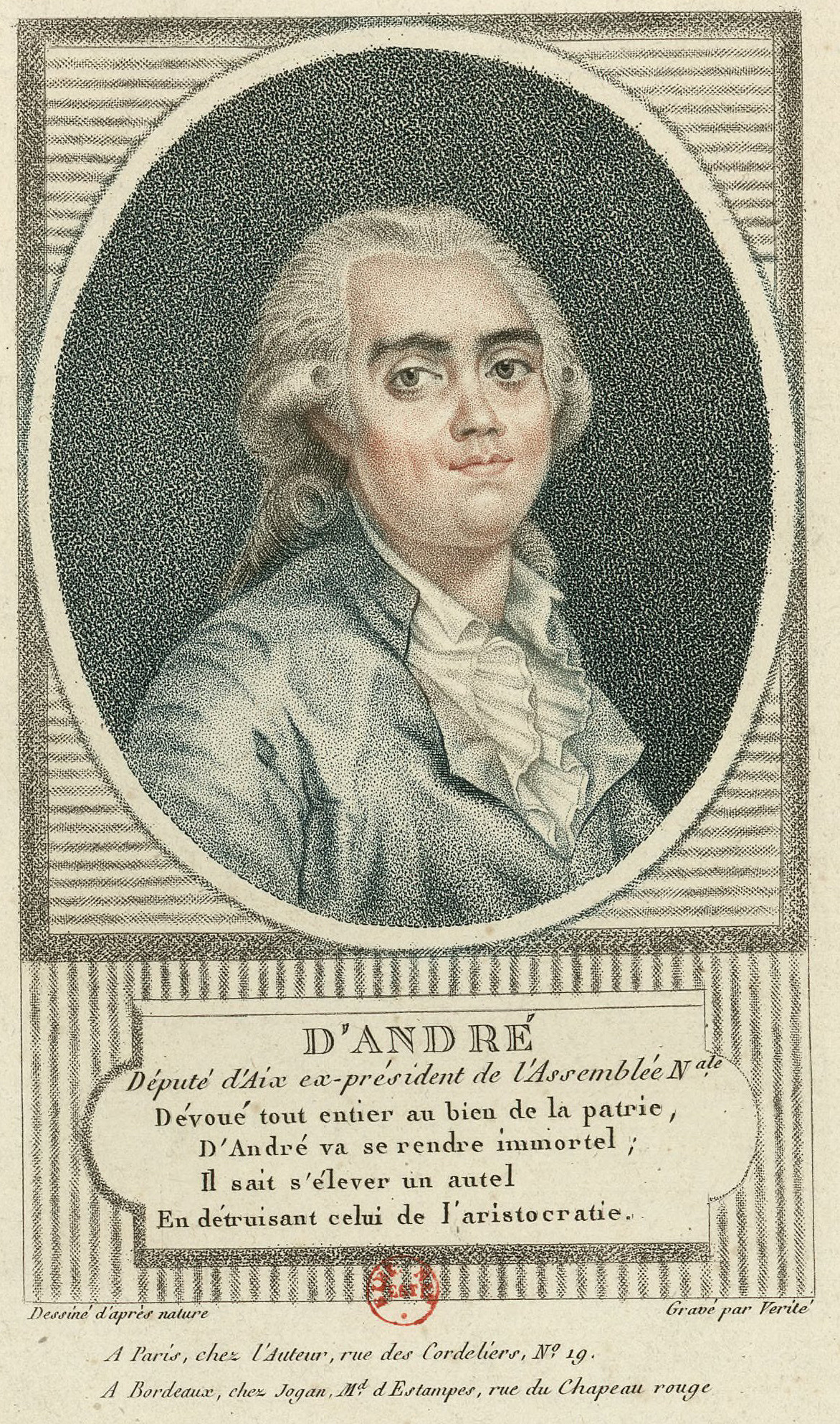 Portrait de Antoine Balthazar Joachim, baron d'André (1759-1825)